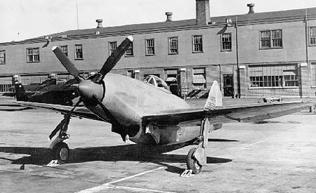 Republic XP-72